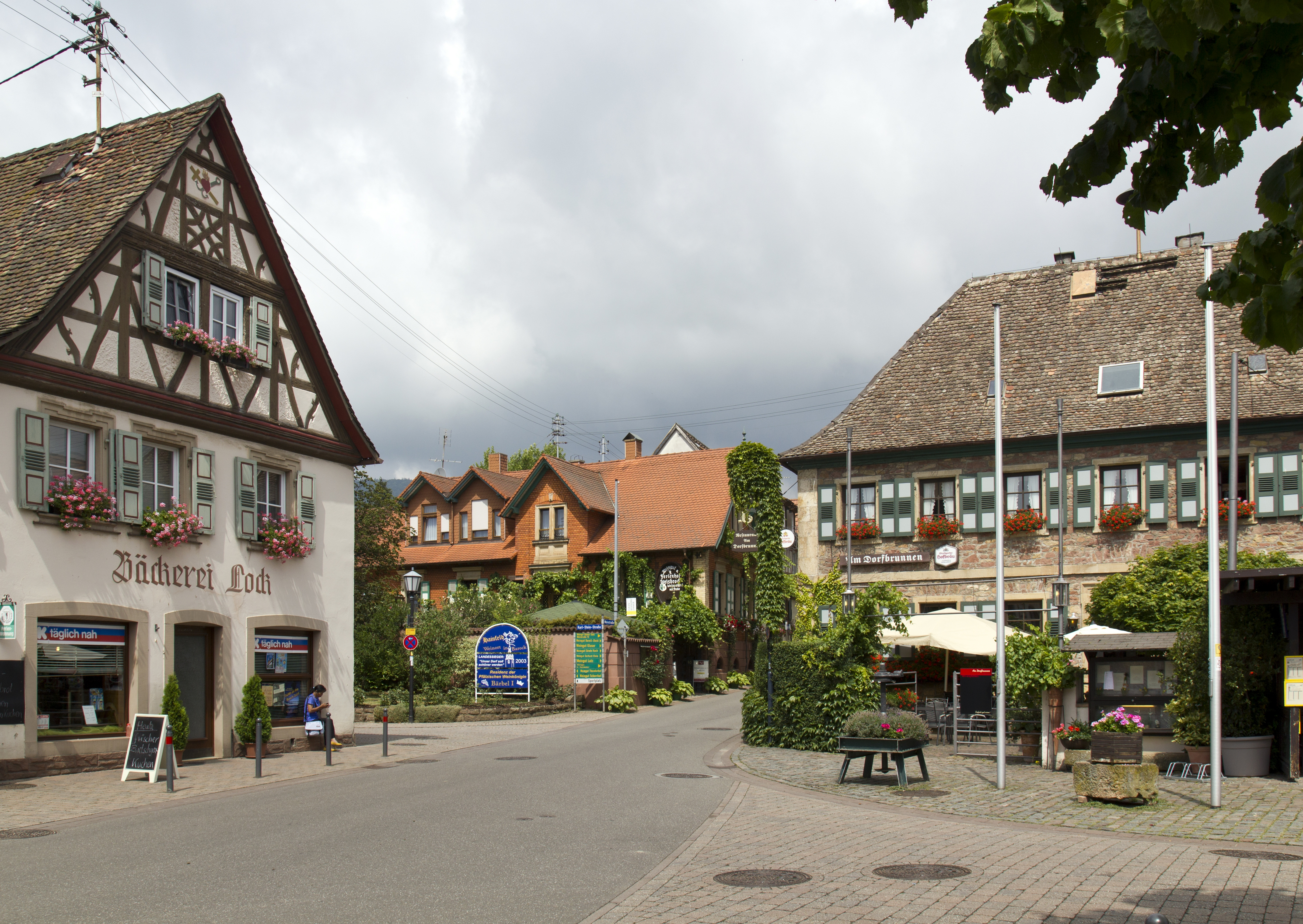 Hainfeld (Pfalz), Blick in die Weinstraße